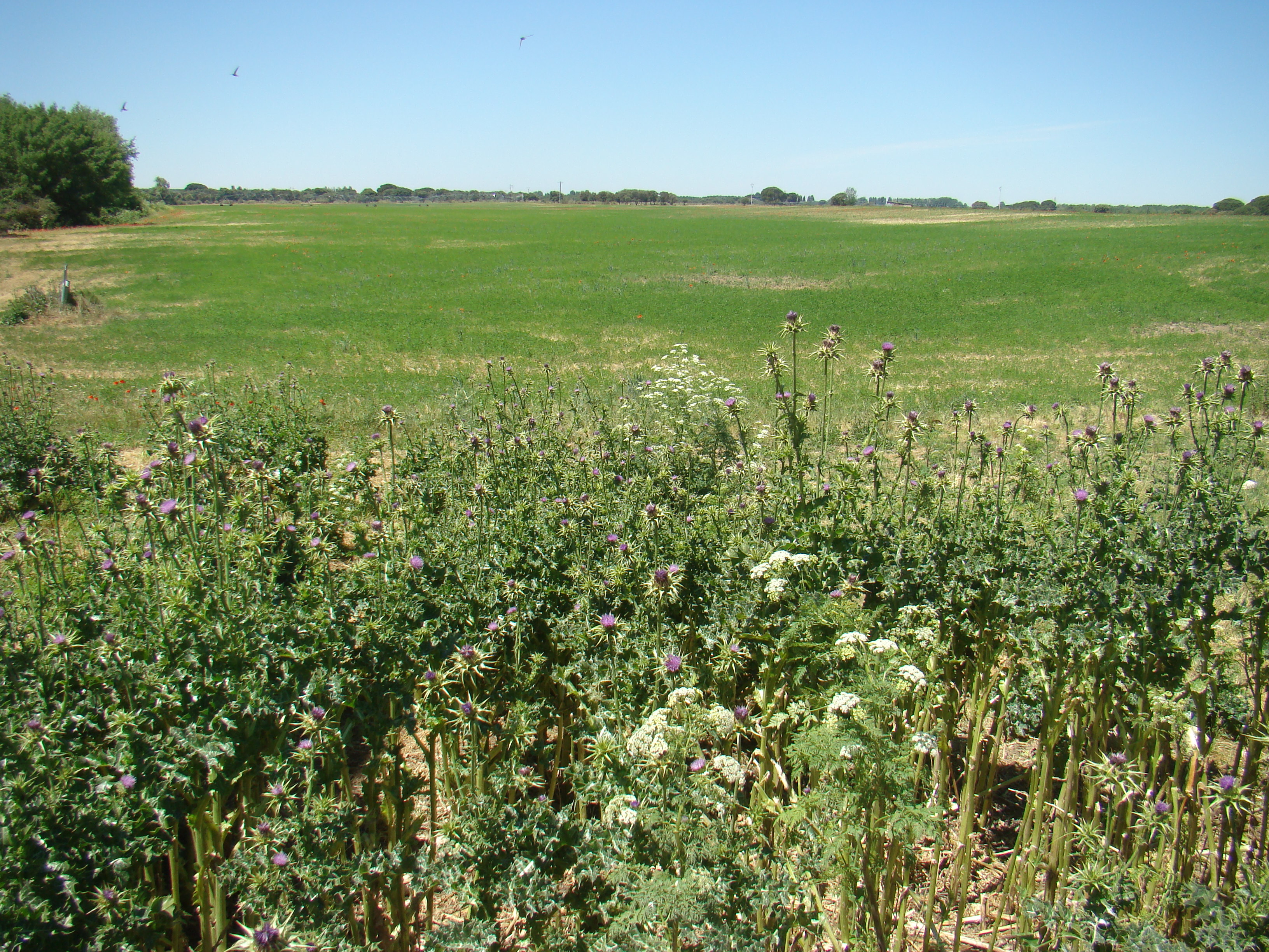 Valladolid, España. Despoblado de Fuentes de Duero. Vegetación y sembrados del entorno.